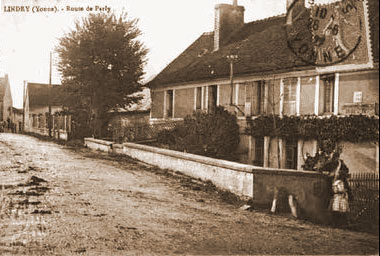 Lindry (Yonne) - route de Parly vers 1900